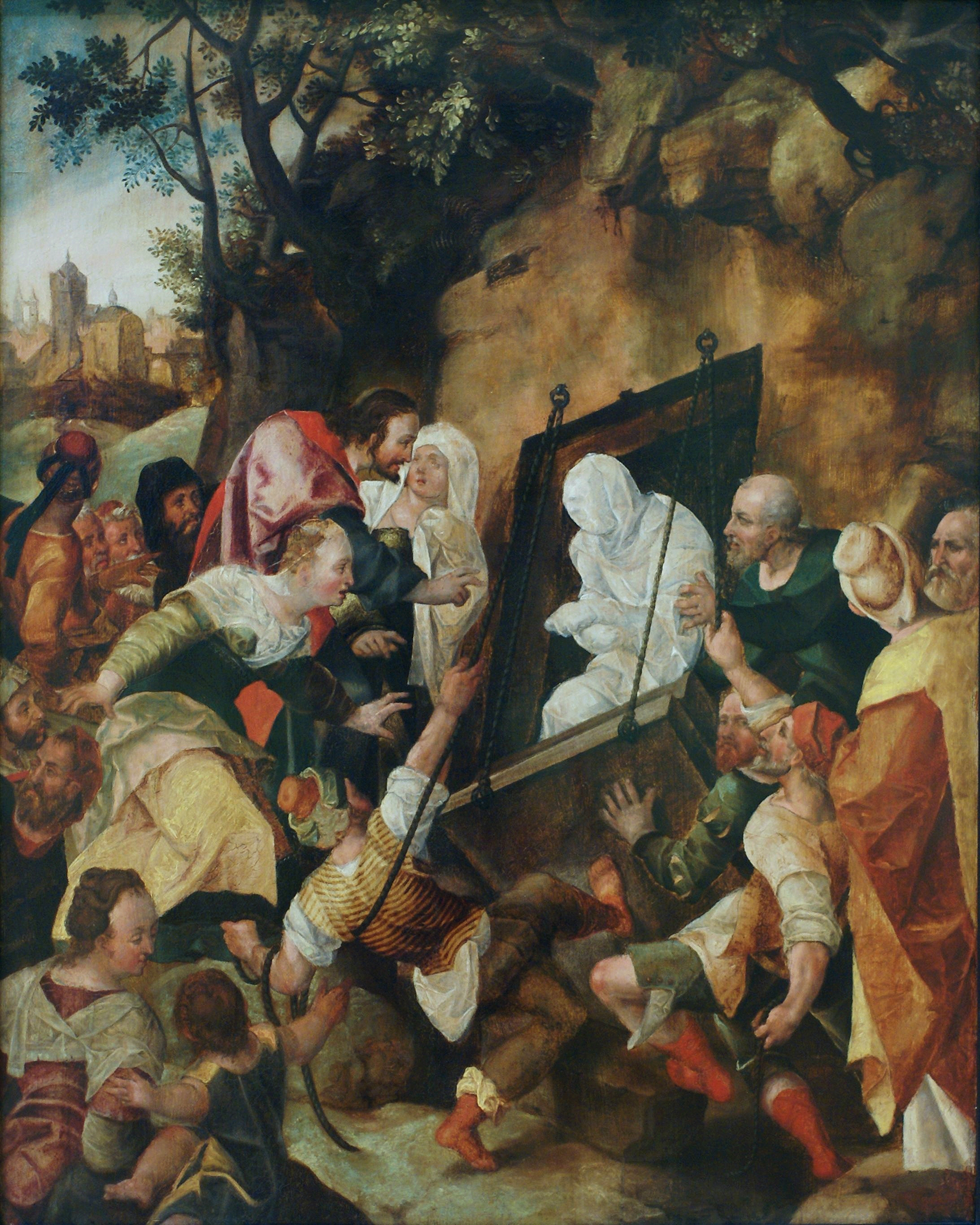 Wendel Dietterlin, Auferweckung des Lazarus. Einziges Gemälde, das dem Künstler sicher zugeschrieben werden kann, da es mit vollem Namen signiert ist. Bei der Person rechts unterhalb der Bildmitte, die den Blick zum Betrachter gewendet hat und mit der Hand an die heruntergelassene Grabplatte fasst, dürfte es sich um ein Selbsportrait Dietterlins handeln (Kurt Martin: Der Maler Wendel Dietterlin. In: Karl Schwingel (Hrsg.): Festschrift für Karl Lohmeyer. West-Ost-Verlag, Saarbrücken 1954, S. 14–29, hier S. 19).